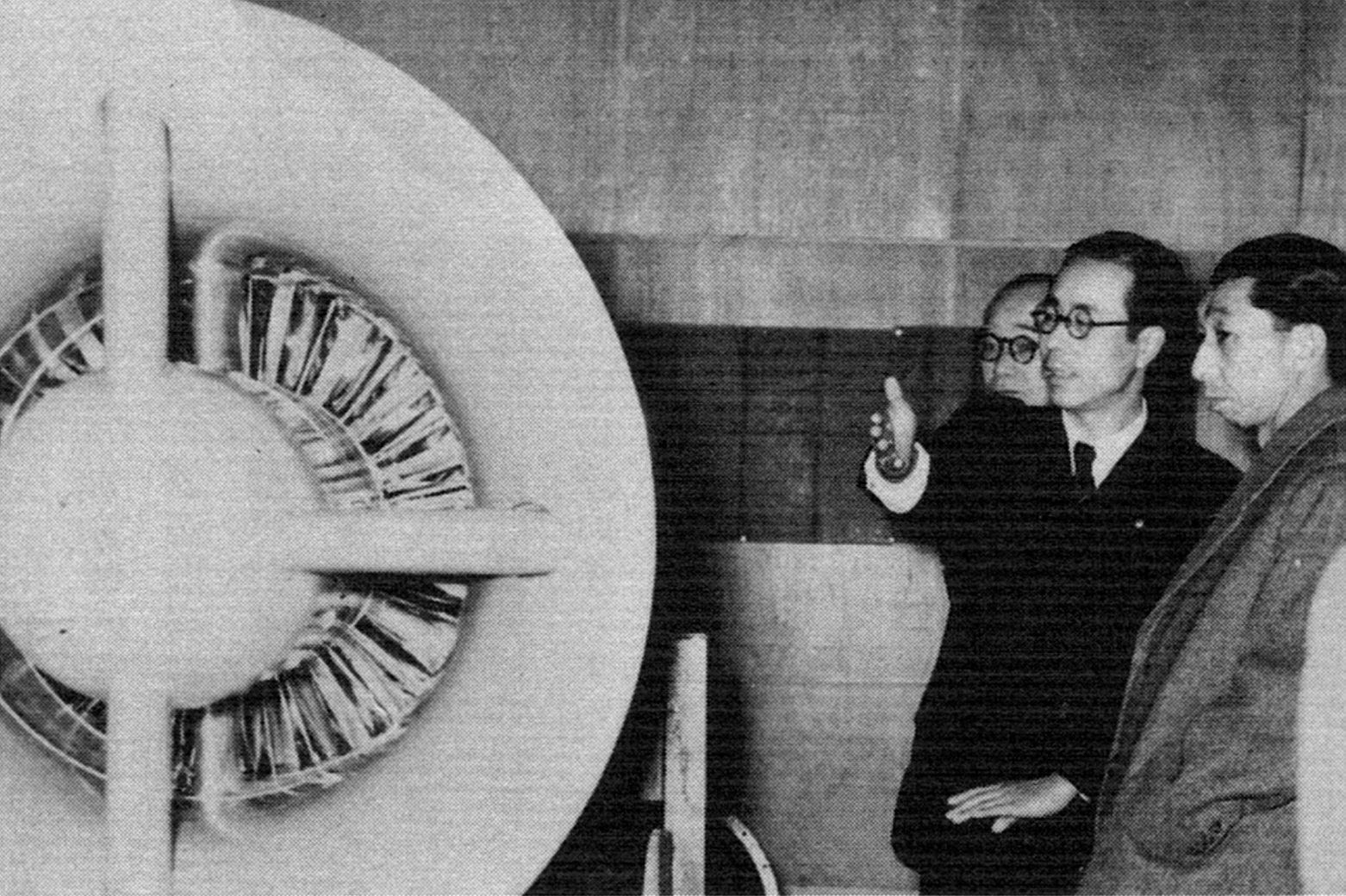 ジェットエンジン「JO-1」を視察する高松宮宣仁親王に説明する渋谷巌